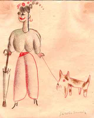 Dibujo